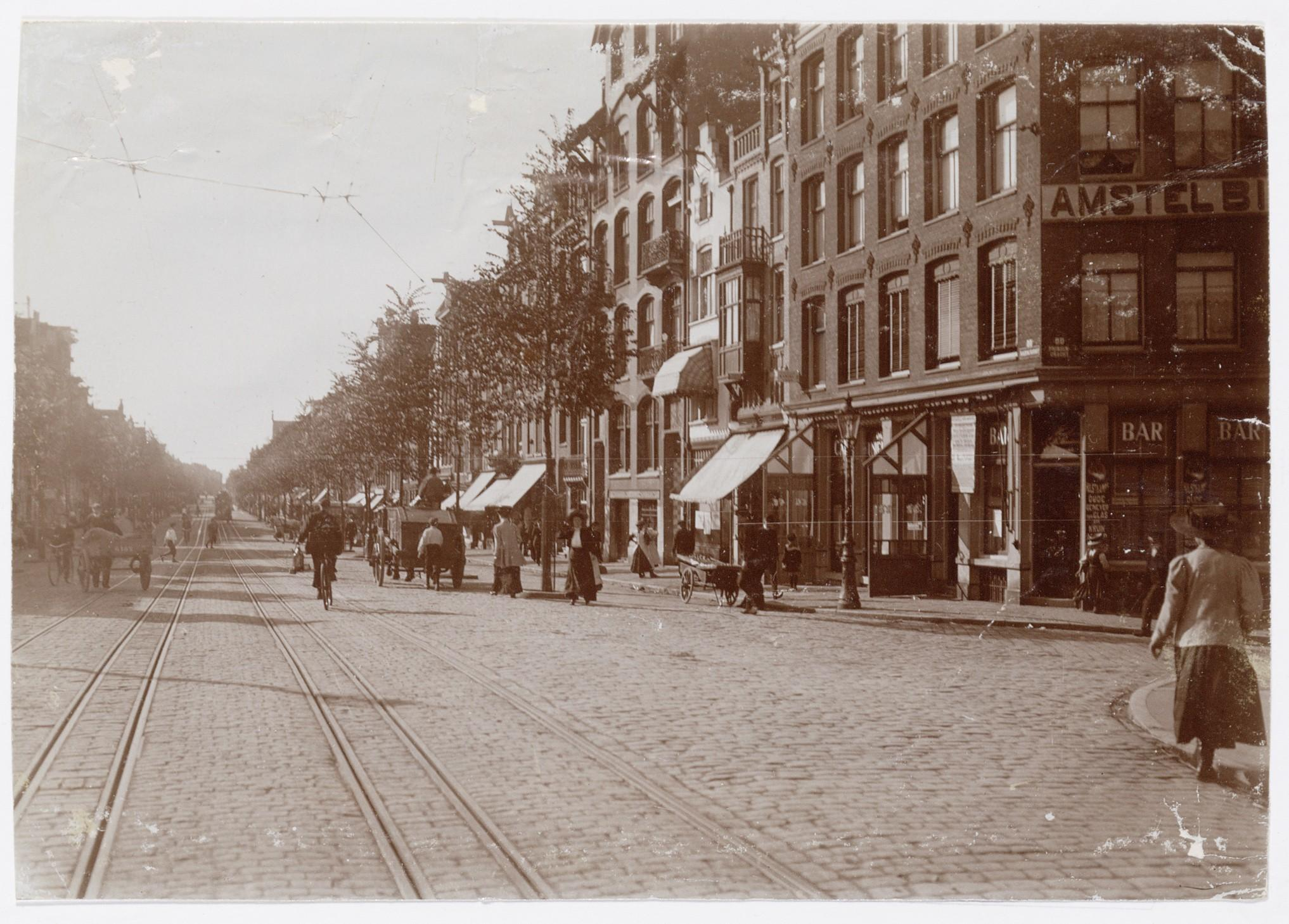 Beschrijving Rozengracht 2-4-6 enz. (rechts, v.r.n.l.) Gezien in westelijke richting vanaf kruising Prinsengracht. Drierailig tramspoor voor de Gemeentetram en de ESM-tram naar Haarlem en Zandvoort. Documenttype foto Vervaardiger Boek-, kantoor- en papierhandel J. Vlieger Collectie Collectie Stadsarchief Amsterdam: foto-afdrukken Geografische naam Prinsengracht Rozengracht Inventarissen Afbeeldingsbestand OSIM00001004496 Generated with Dememorixer